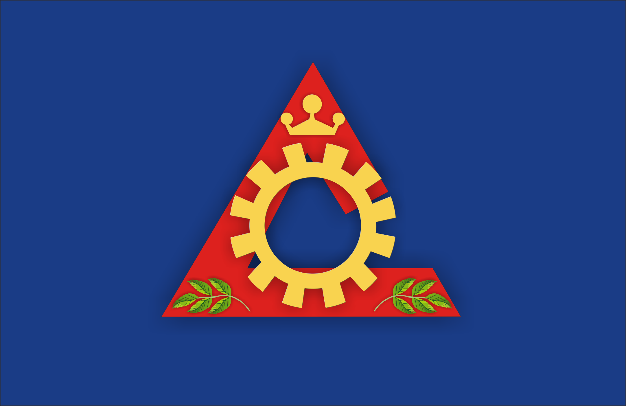 Bandeira do Município de Cataguases, Minas Gerais, Brasil